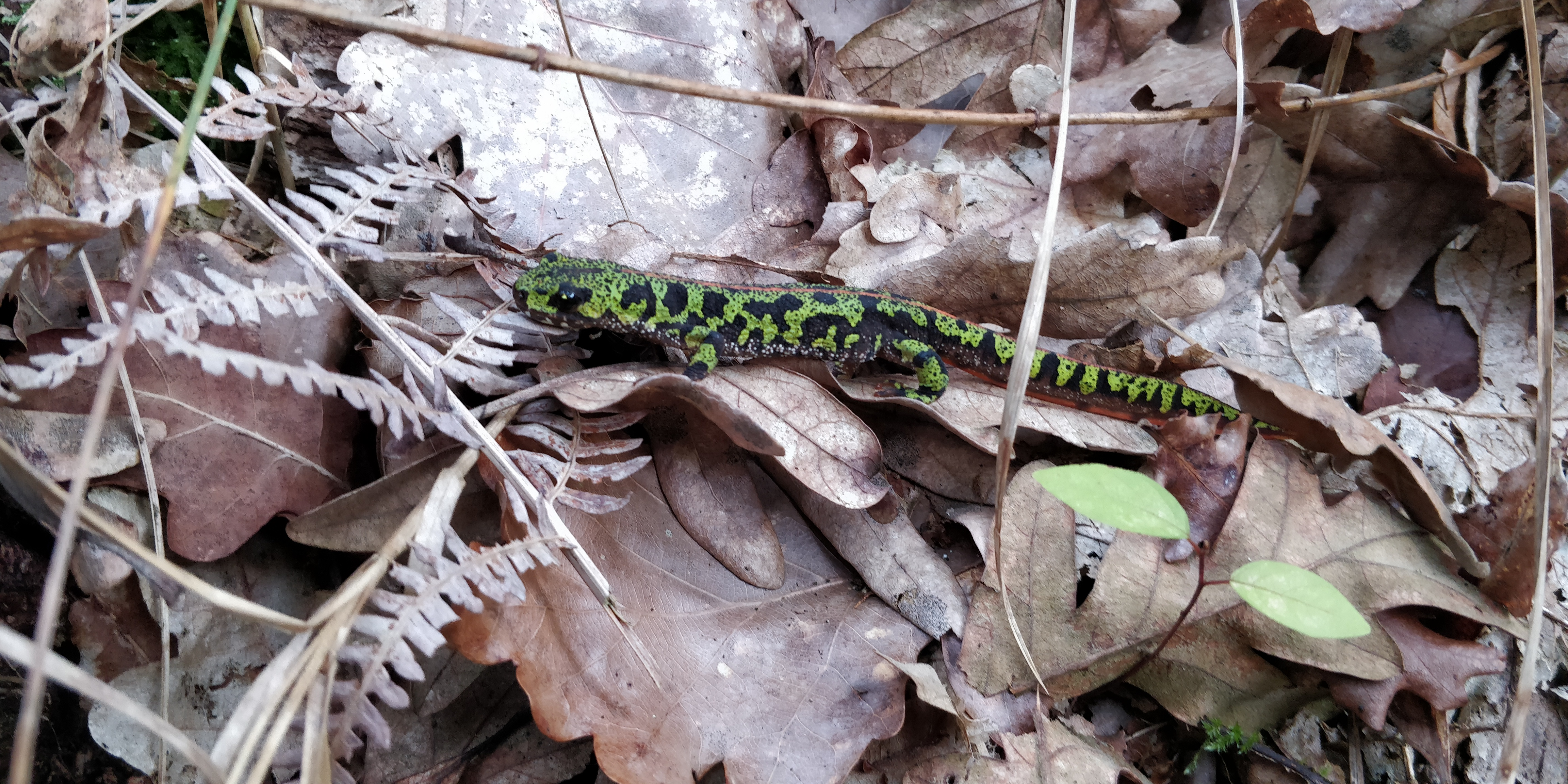 Triton marbré femelle vu dans les Landes (sud ouest)